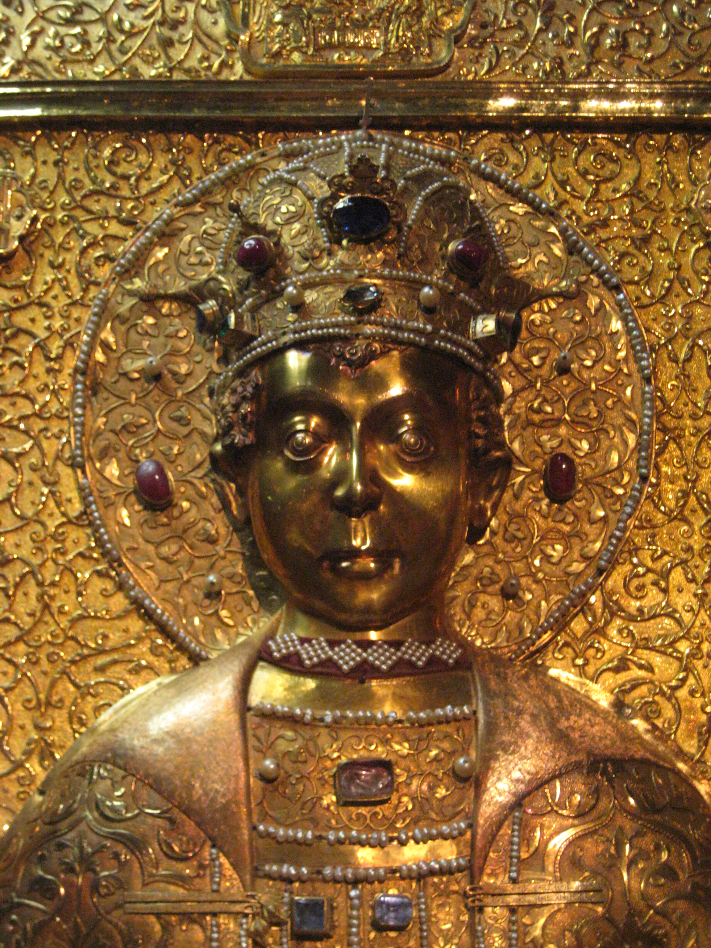 КРЫШКА РАКИ ЦАРЕВИЧА ДИМИТРИЯ Мастера Павел Алексеев, Дмитрий Алексеев, Василий Коровников, Тимофей Иванов, Василий Малосолец под руководством Гаврилы Овдокимова 1628–1630 годы Мастерские Московского Кремля Золото, серебро, драгоценные камни, жемчуг, стекло, дерево, ткань; чеканка, литье, резьба, канфарение, золочение, эмаль 158,3 х 70,3 Происходит из Архангельского собора Московского Кремля Реставрирована в 1985 году Н.И. Долговым ММК инв. МР-9989